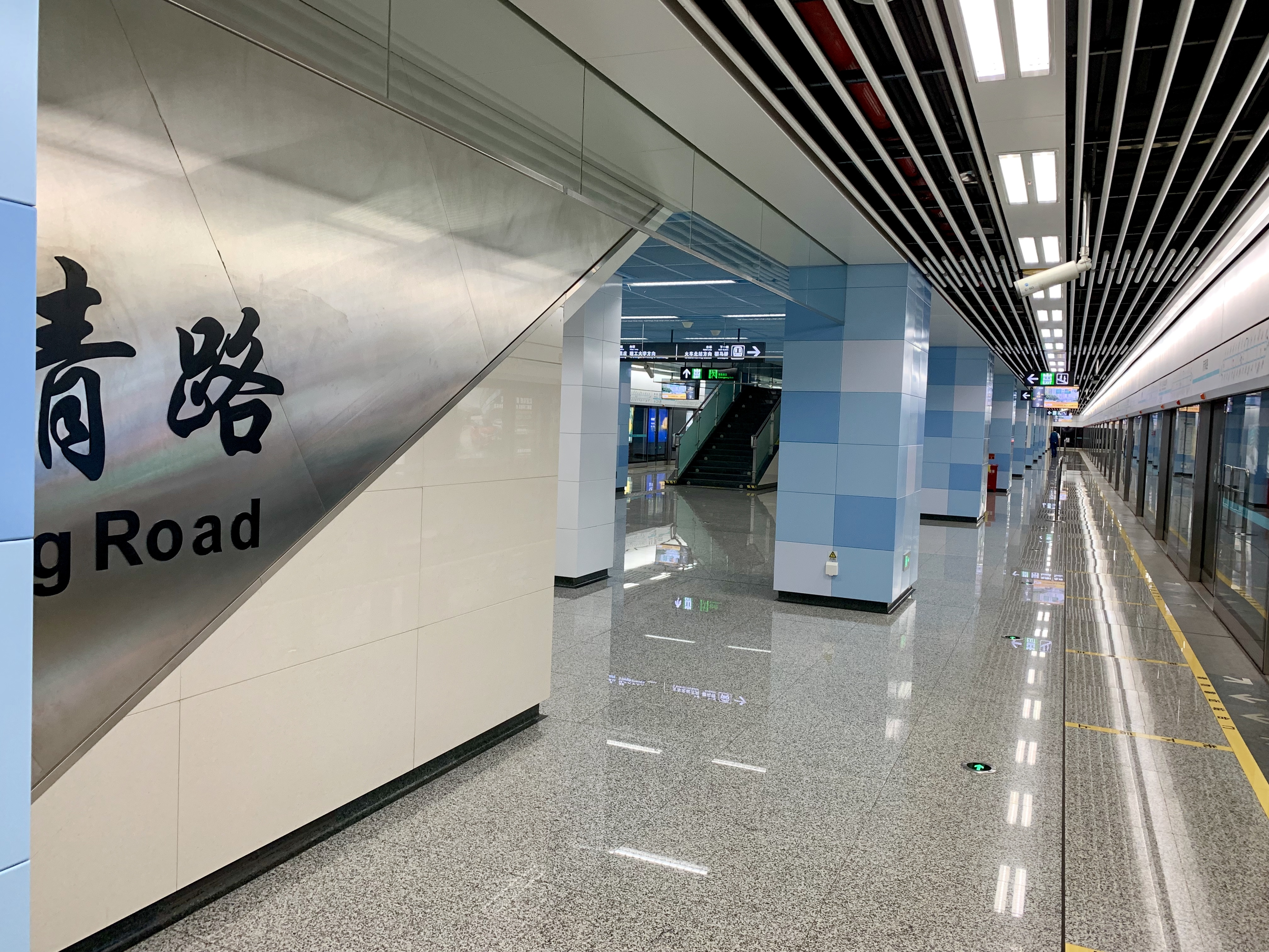 成都地铁府青路站